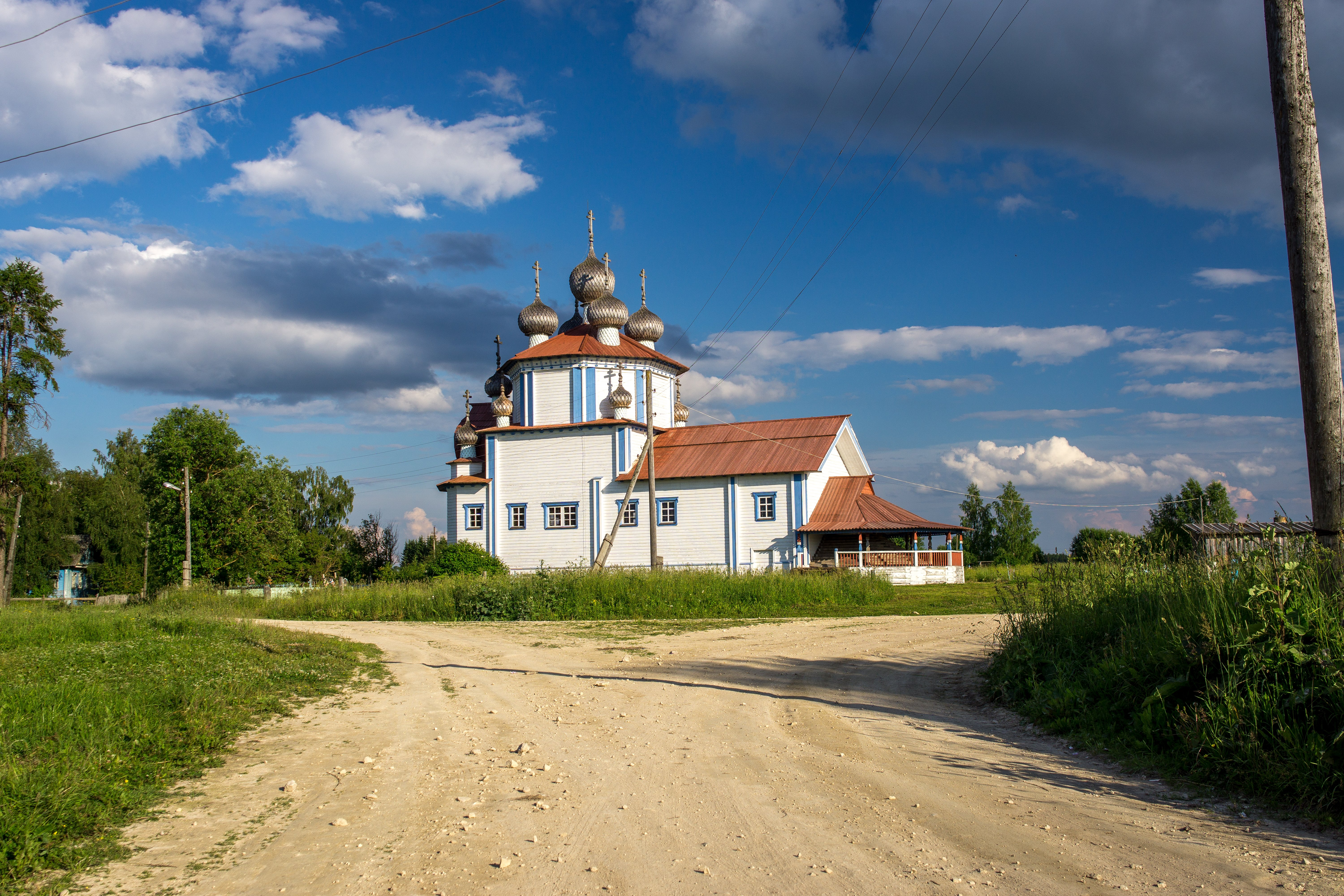 Церковь Богоявления: Рубцово (Лядины), Каргопольский район, Архангельская область